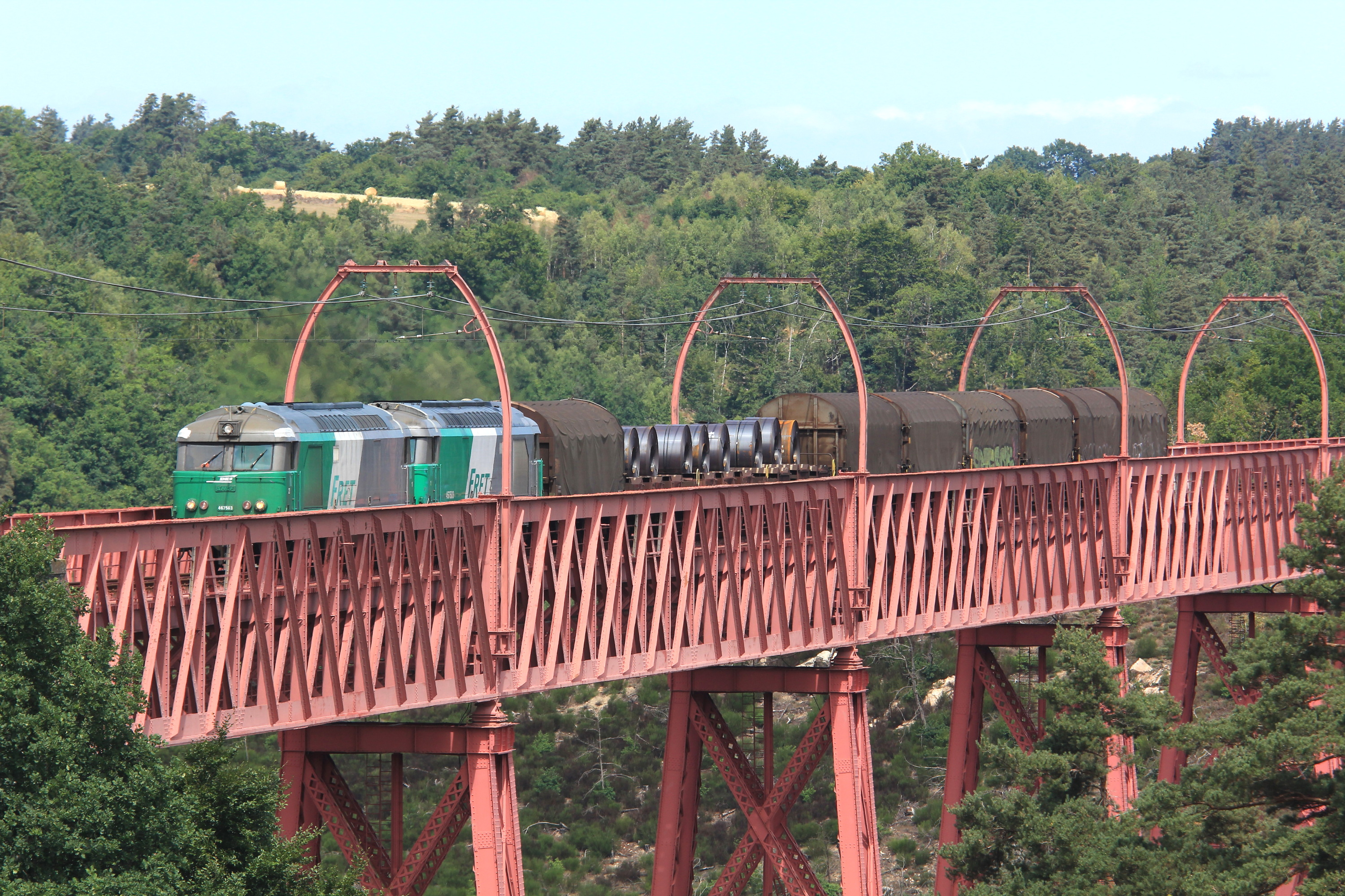 Train de fret pour l'usine Arcelor Mittal de Saint-Chély-d'Apcher franchissant le viaduc de Garabit.